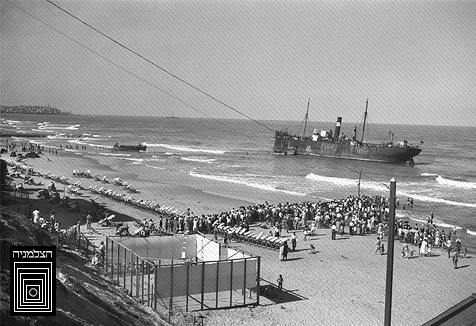 אנית המעפילים פאריטה מול חופי תל אביב, 1939